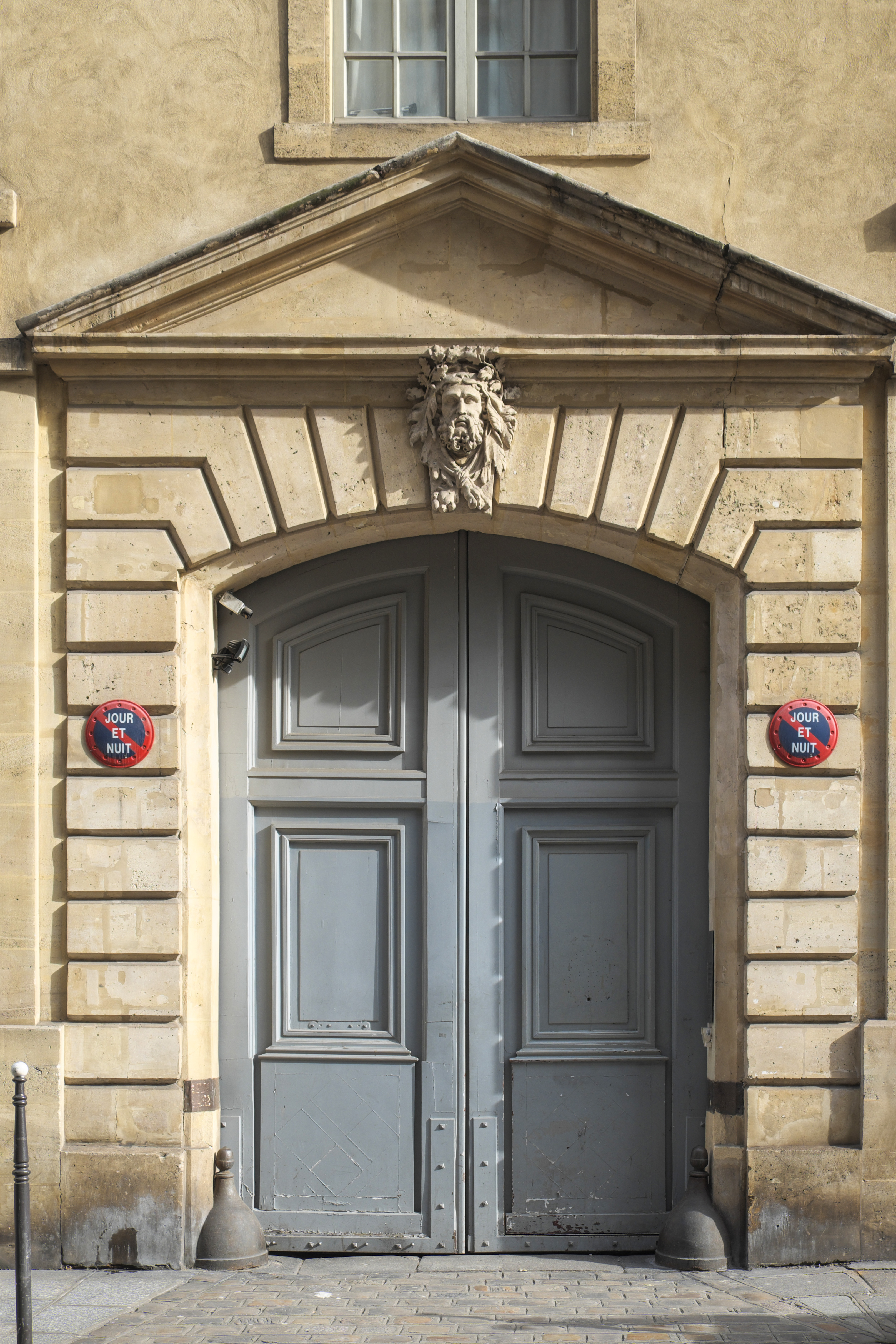 Hôtel de Bondeville, 4 rue des Haudriettes, im 3. Arrondissement in Paris (Île-de-France/Frankreich), Maskaron über dem Portal